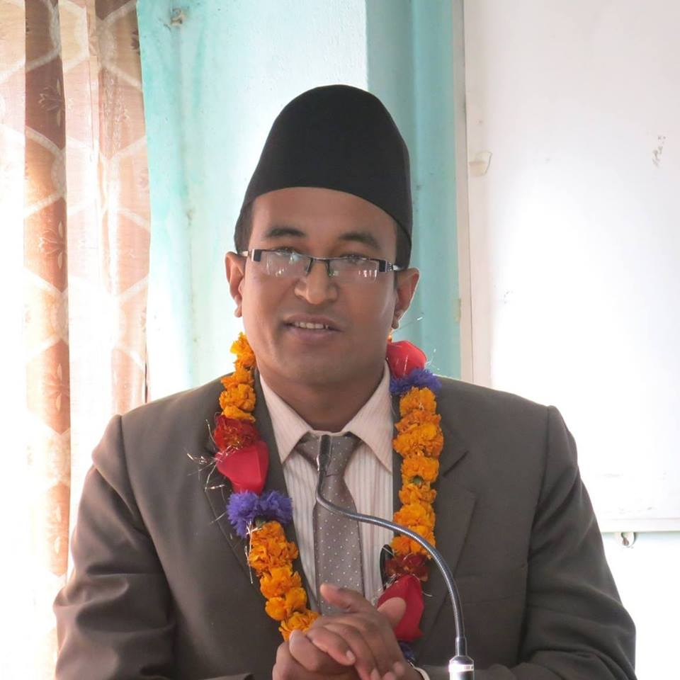 नेपाली: रसिक साहित्यकार हुन् ।